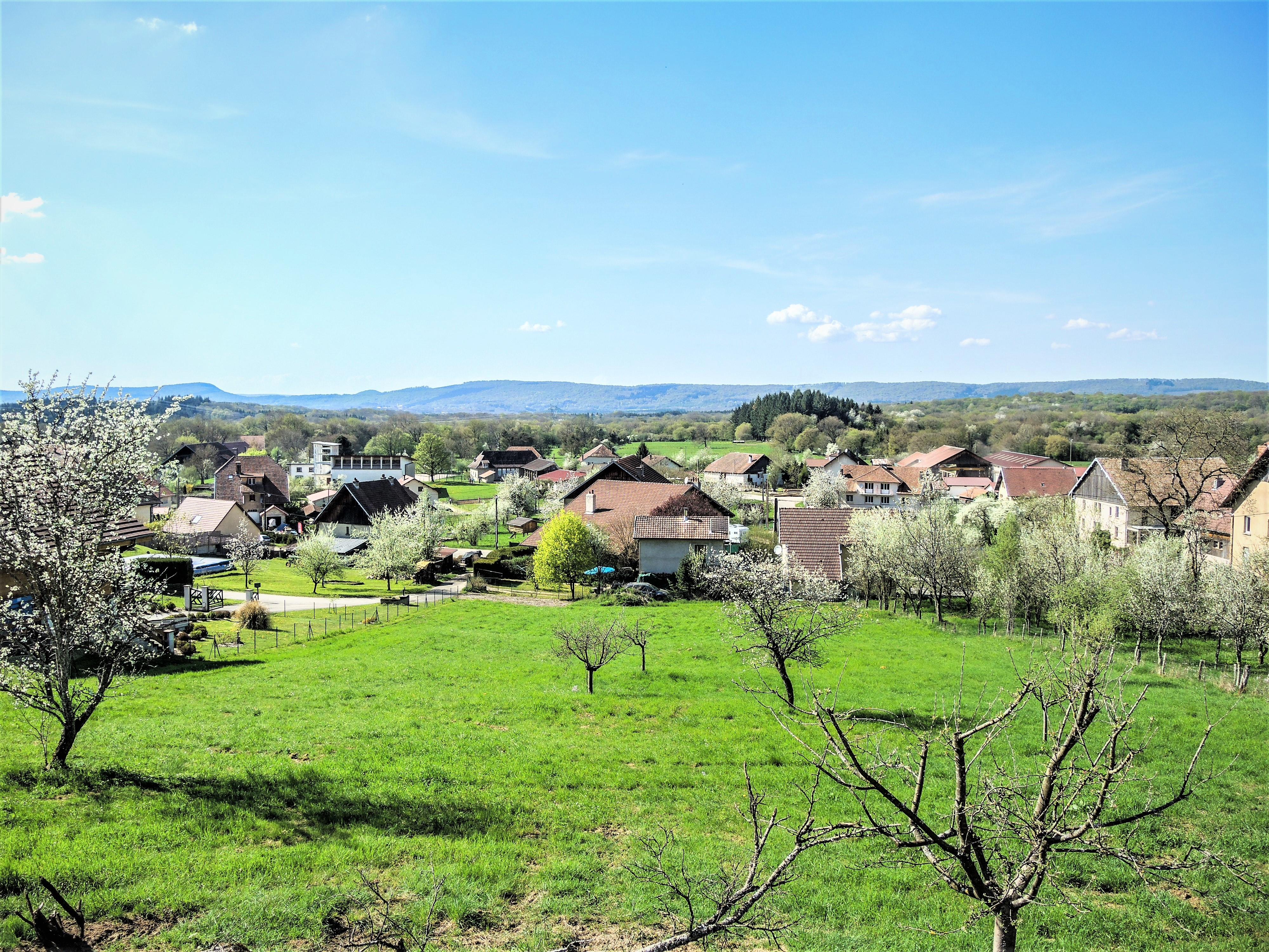 Centre du village d'Aïssey, vu de la chapelle Saint-Nicolas. Doubs